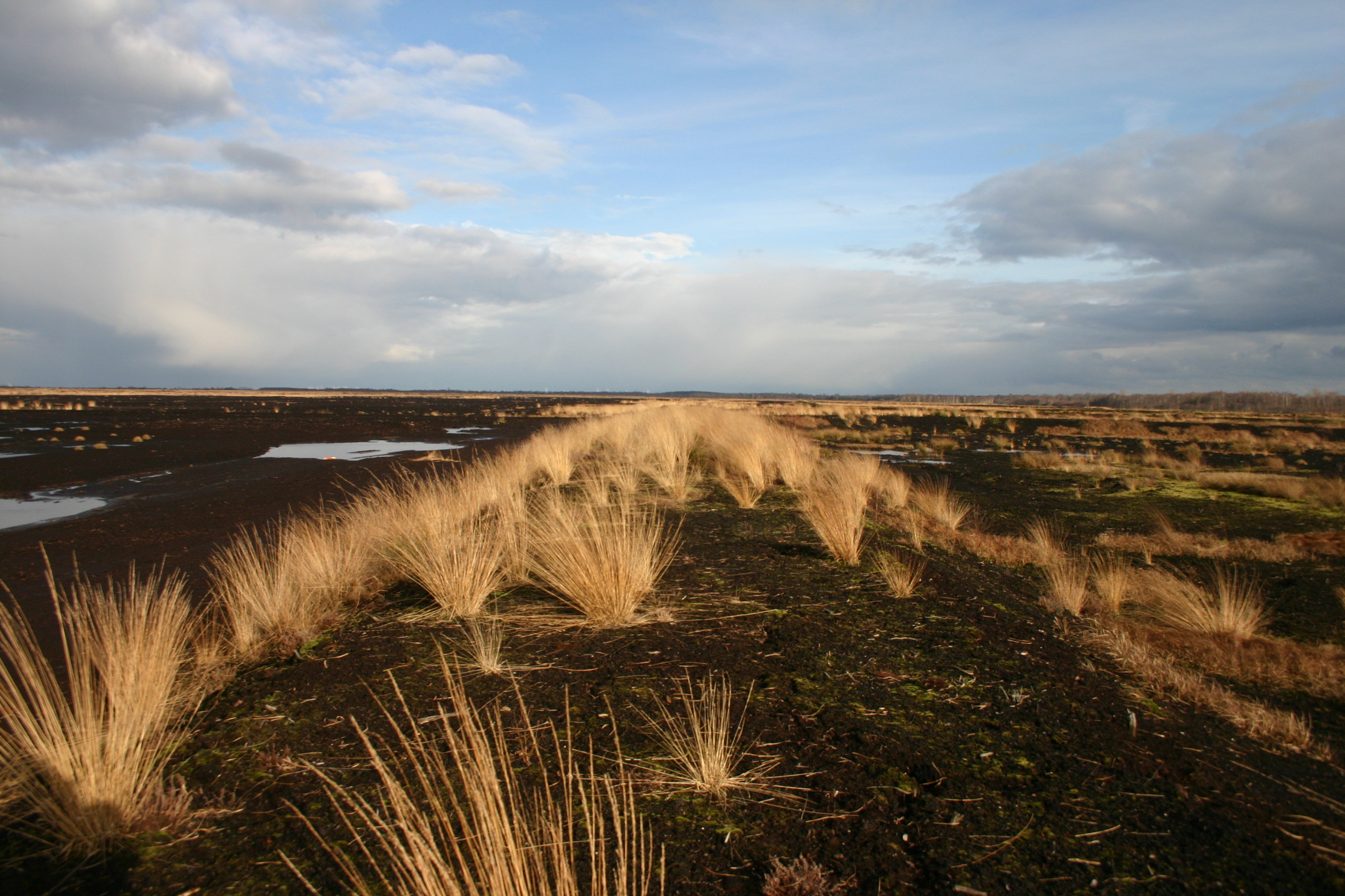 Das Hochmoor ist abgetorft und wird renaturiert. Pfeifengras.